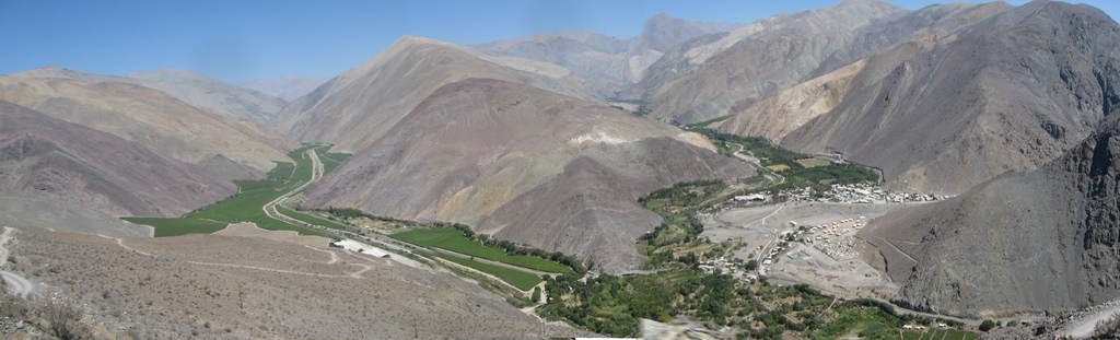 Unión de los ríos y valles de El Transito (izquierda) y valle del rio El Carmen (derecha)